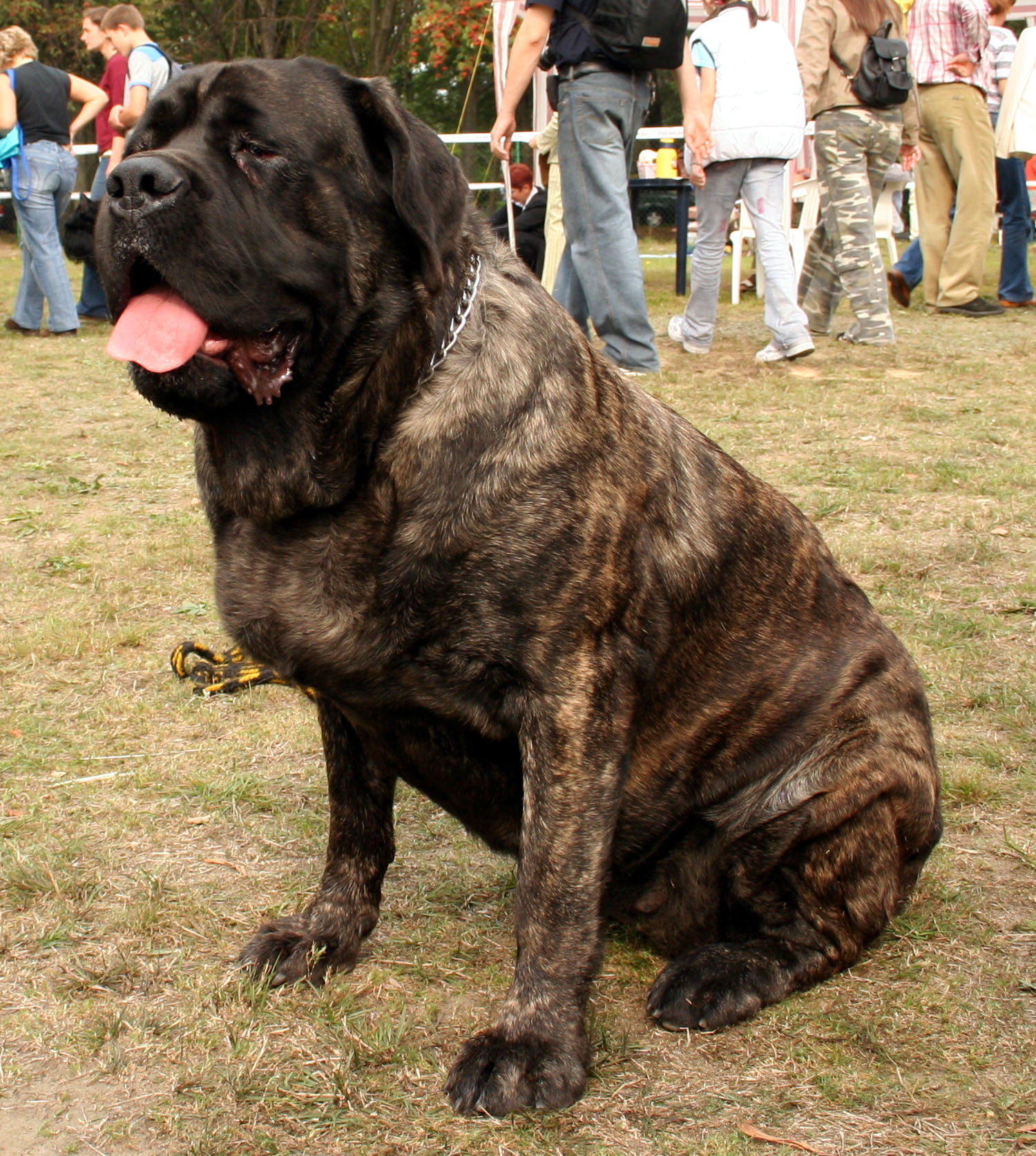 Mastif_angielski_pręgowany na krajowej wystawie w Rybniku - Kamieniu